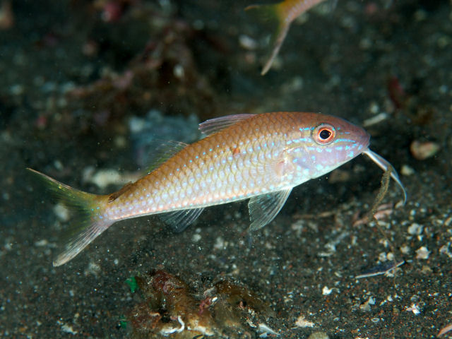 タカサゴヒメジ Parupeneus heptacanthus